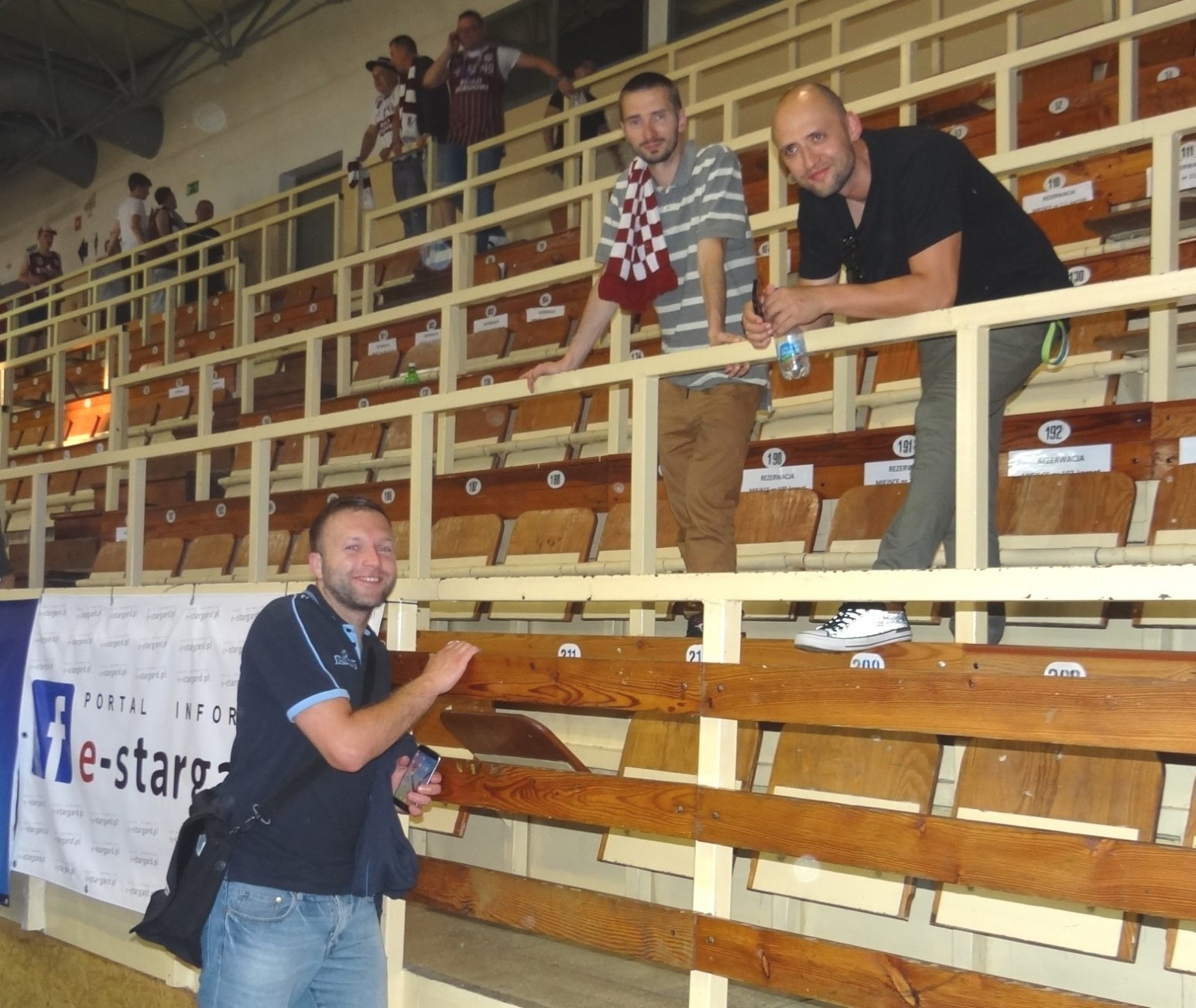 Byli zawodnicy Spójni, 12.05.2018